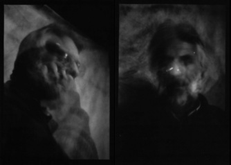 siehe: Mehrfachbelichtung(autonome; lochkamera)